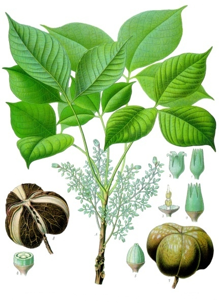 Kautschukbaum. A blühender Zweig von Hevea Brasiliensis Müll. Arg. 1/2 natürlicher Grösse nach der Natur. Kultiviertes Exemplar des Kulturtuin zu Tijkeumeuk auf Java (Herbar V. Schiffner). 1 männliche Blüte im Aufblühen; 2 dieselbe vollständig entwickelt, vergrössert; 3 Staubblätter mit zentraler Säule, vergrössert; 4 weibliche Blüte, geschlossen, vergrössert; 5 Fruchtknoten bei beginnender Reife, vergrössert; 6 Querschnitt desselben, vergrössert; 7 unreife Frucht natürlicher Grösse; 8 reife Frucht in natürlicher Grösse.